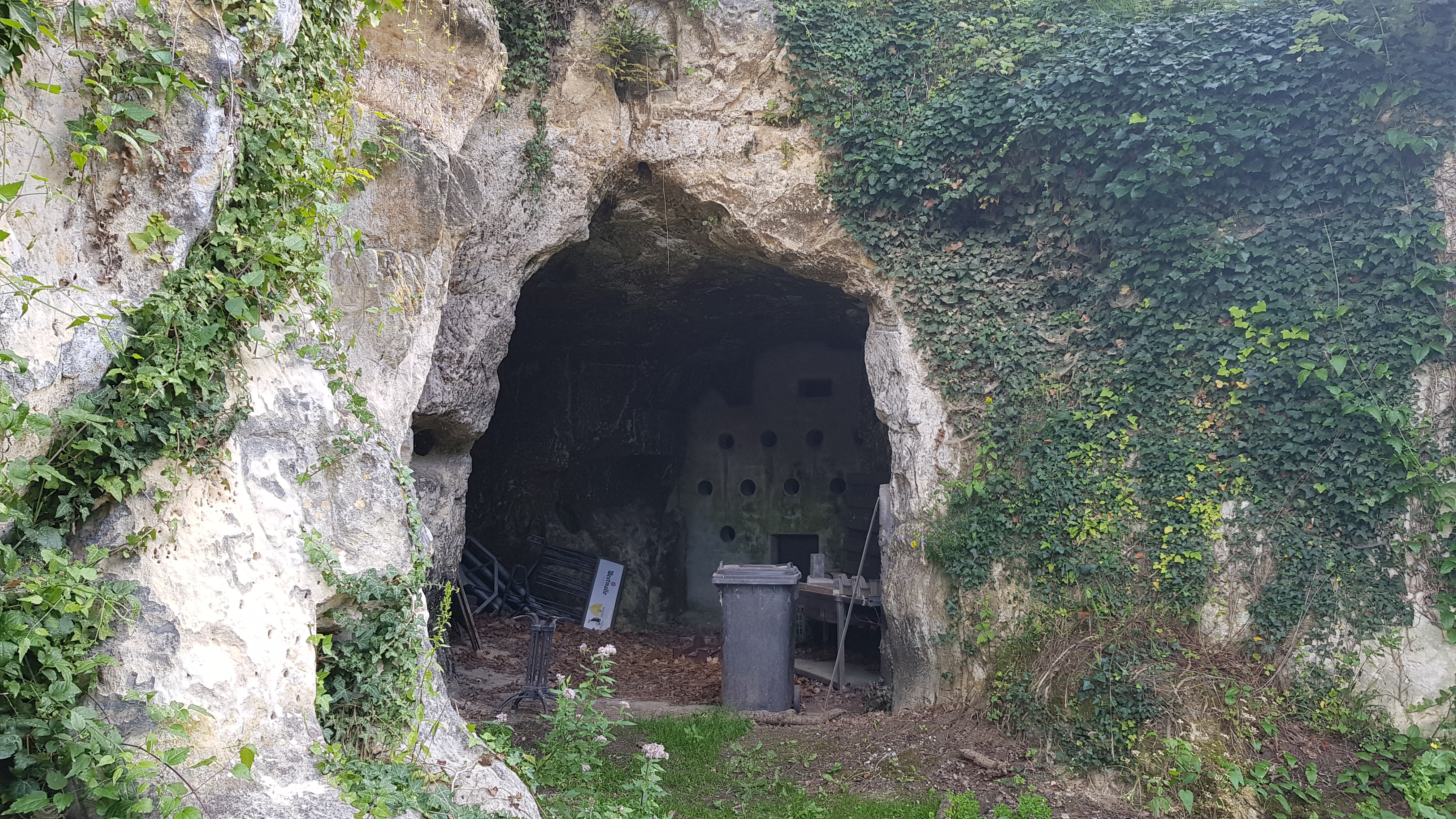 Heidegroeve of Groeve Heide, Geulhem, Nederland